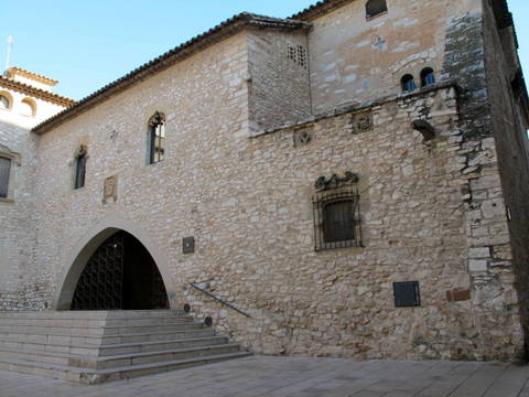 castell de la Geltru - Vilanova i la Getrú